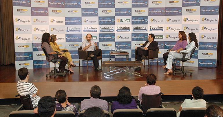 Os eventos foram realizados em parceria com a Federação das Indústrias do Rio Grande do Norte (Fiern), na auditório da Casa da Indústria.